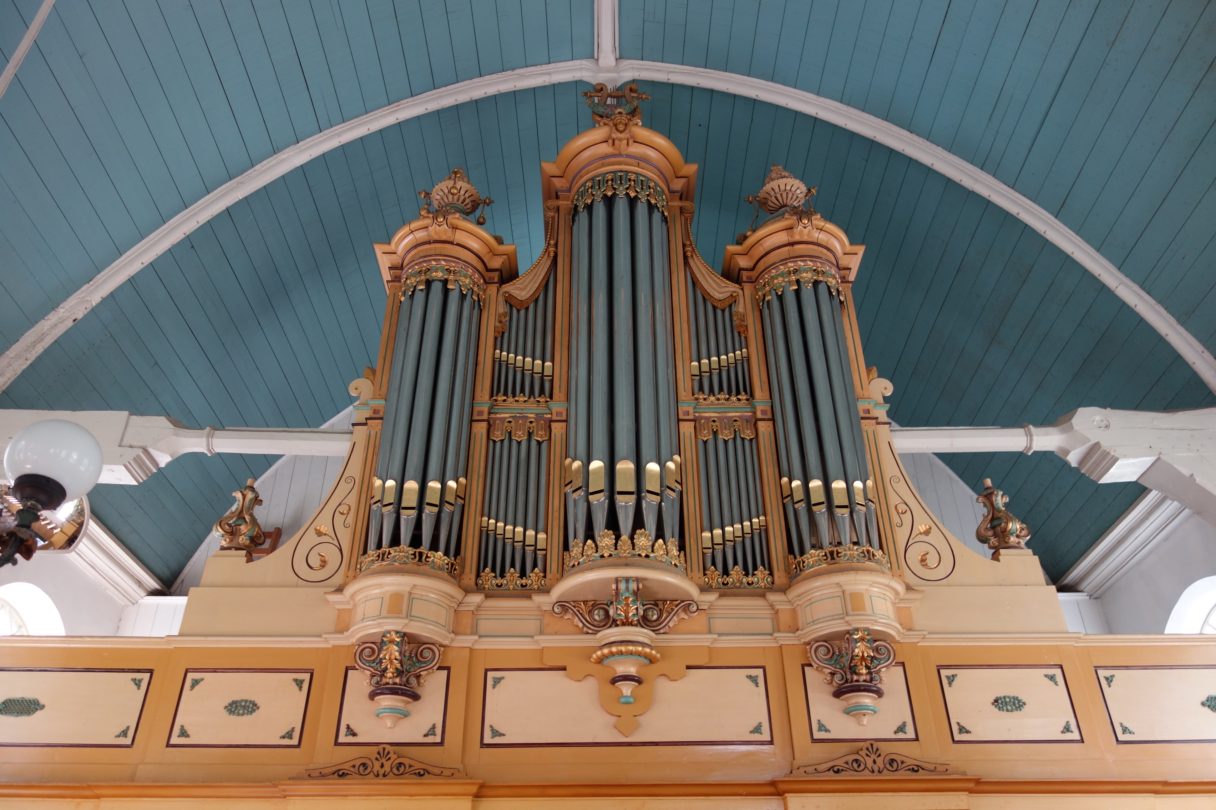 Orgel van de Hervormde kerk in Westerblokker. Orgel is gemaakt door Lodewijk Ypma. Of hij ook de ontwerper van de kast is, is niet bekend.